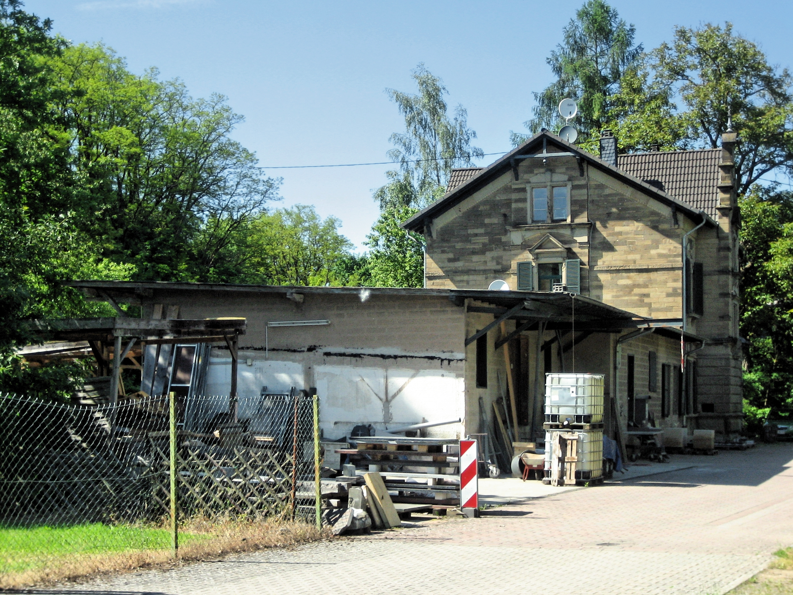 Alter Bahnhof von Lauterecken